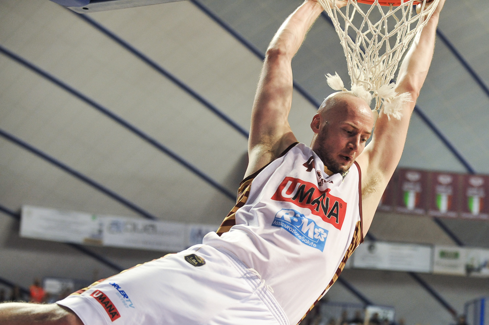 Hrvoje Peric schiaccia con la maglia della Reyer Venezia